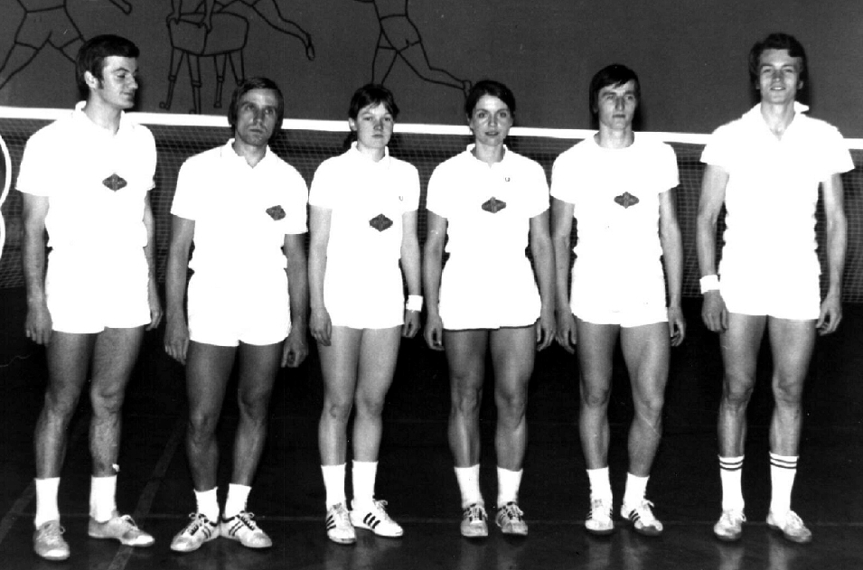 Team Fortschritt Tröbitz 1973